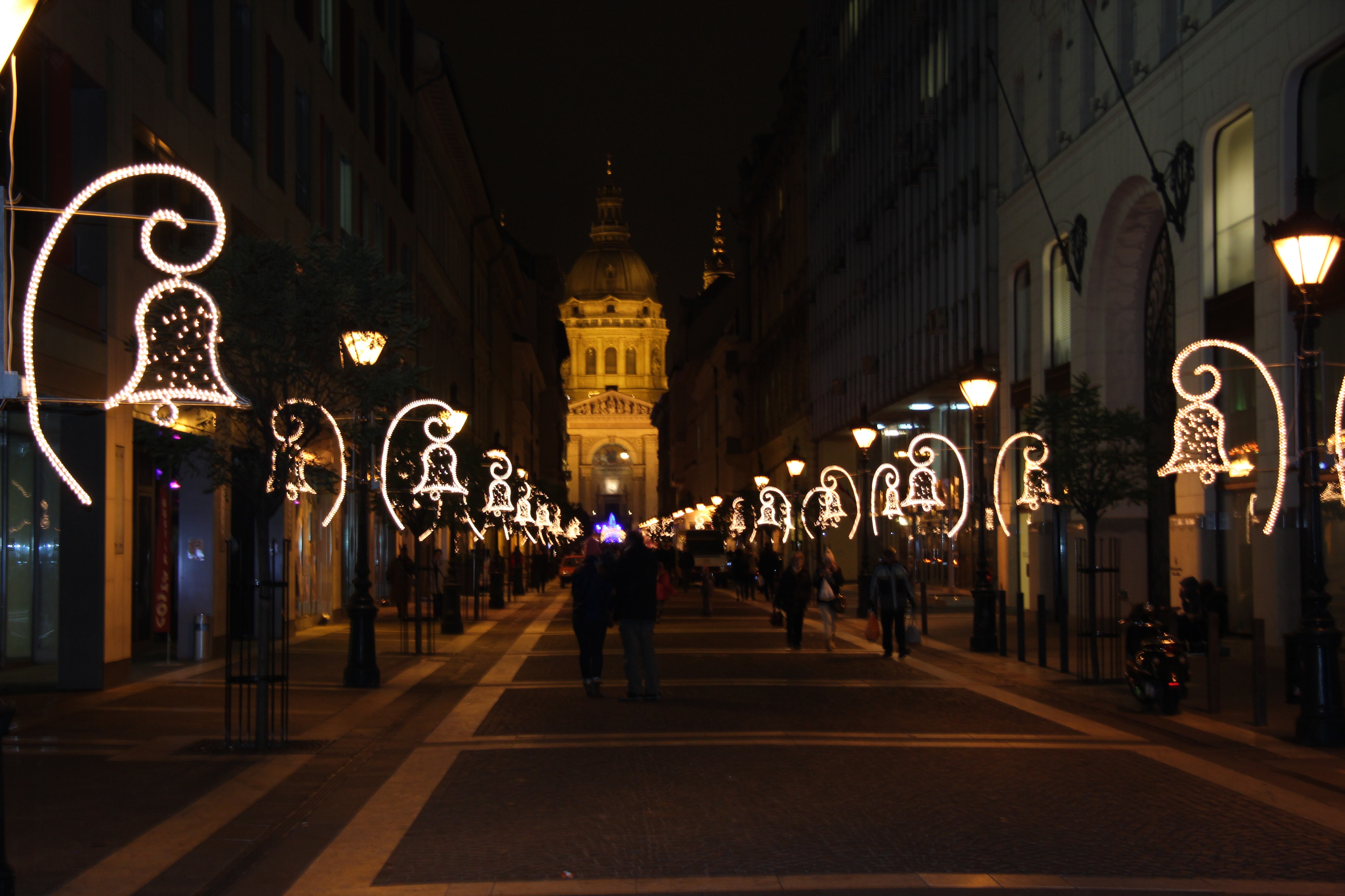 Weihnachtsbeleuchtung in Budapest